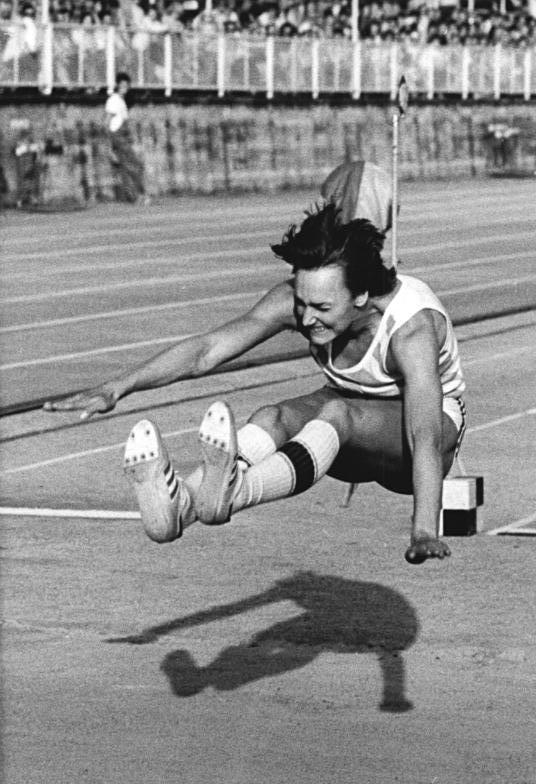 Heike Drechsler (geb. Heike Daute) ADN-ZB Hiekel 19.5.84-wo-Dresden: Leichtathletik-Sportfest. Nur eine Woche Bestand hatte der Weitsprung-Rekord von Heike Daute (SC Motor Jena) . Sie steigerte ihre Leistung vom Jenaer Sportfest bei 1,6 m-s Rückenwind um 5 Zentimeter auf 7,34 Meter und näherte sich damit dem Weltrekord der Rumänin Anisoara Cusmir bis auf 10 Zentimeter.